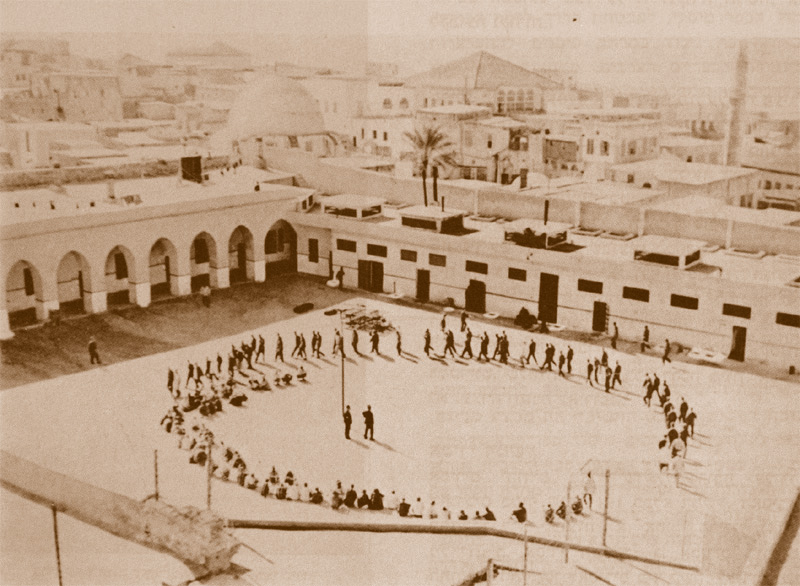 כלא עכו אסירים יהודים בחצר הכלא 1947 ארכיון ההגנה